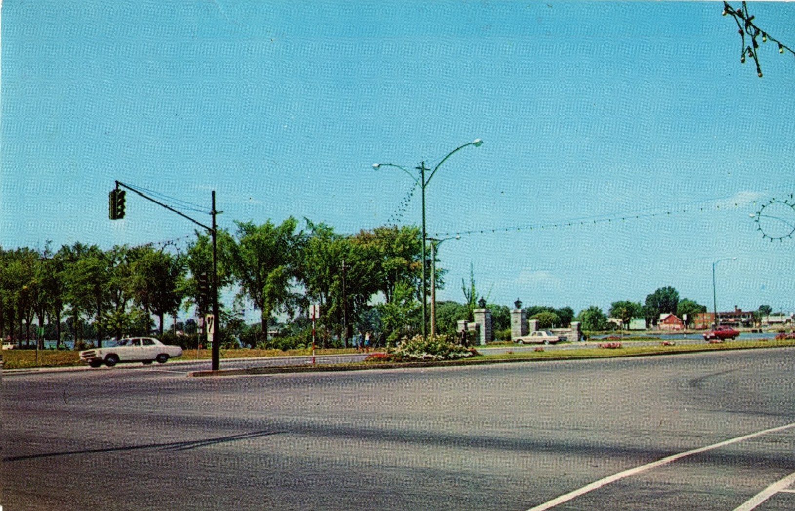 Intersection des rues Victoria et Jacques-Cartier à Valleyfield dans les années 70